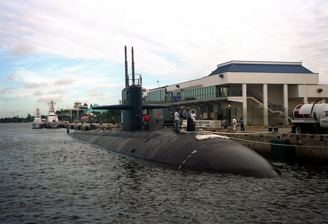 USS Philadelphia (SSN-690)